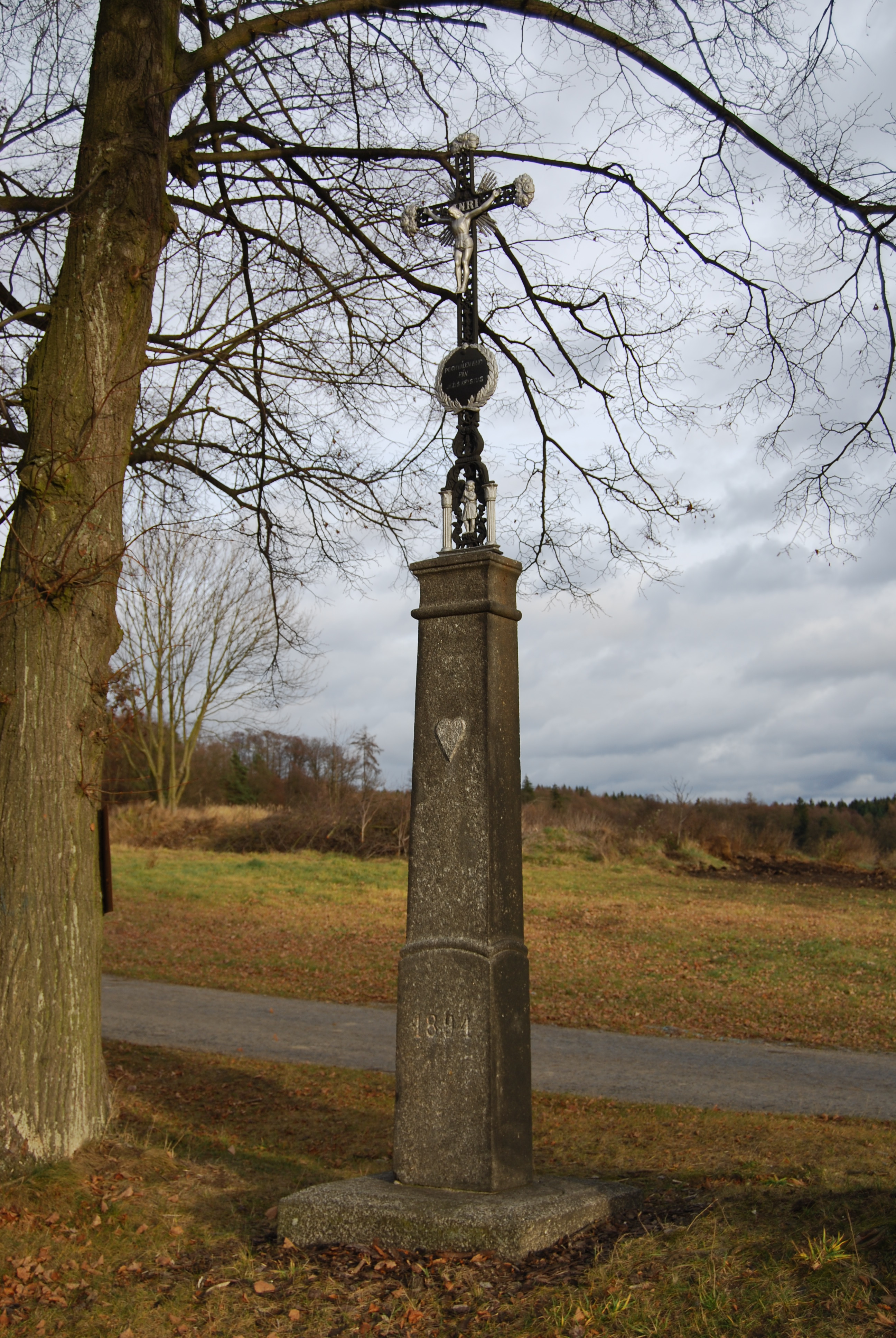 Kříž poblíž obce , na křižovatce. Paseky. Okres Písek. Česká republika.